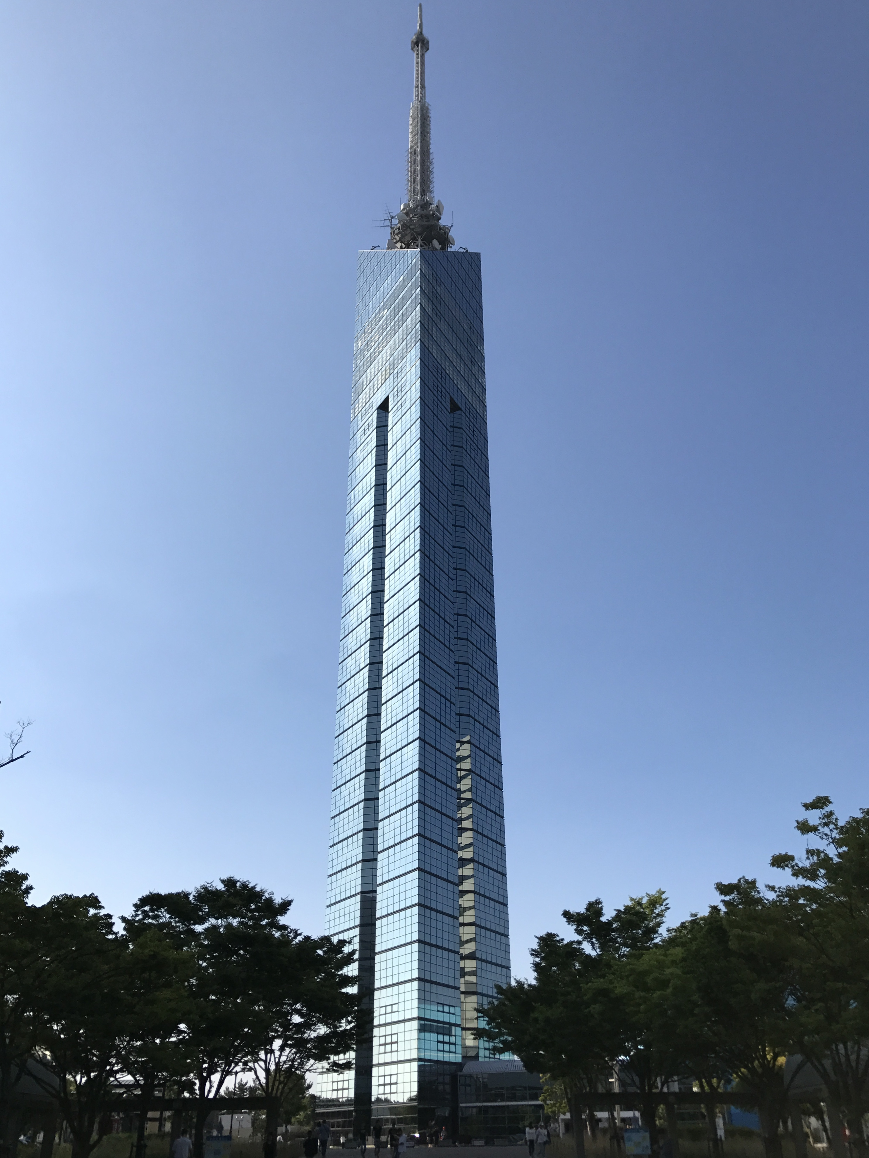 南側より望む福岡タワー